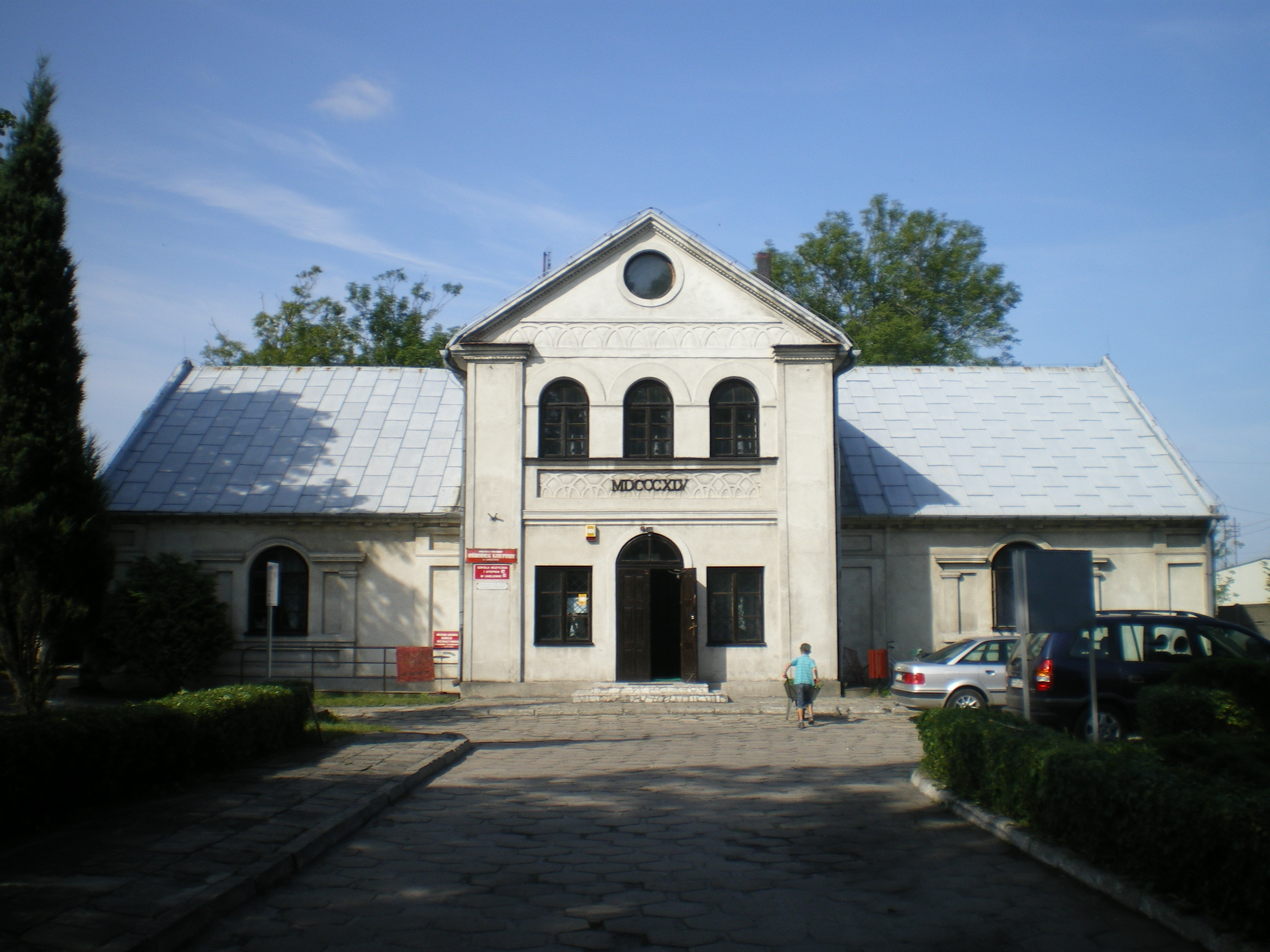 Uniejów, dwór, ok. 1845